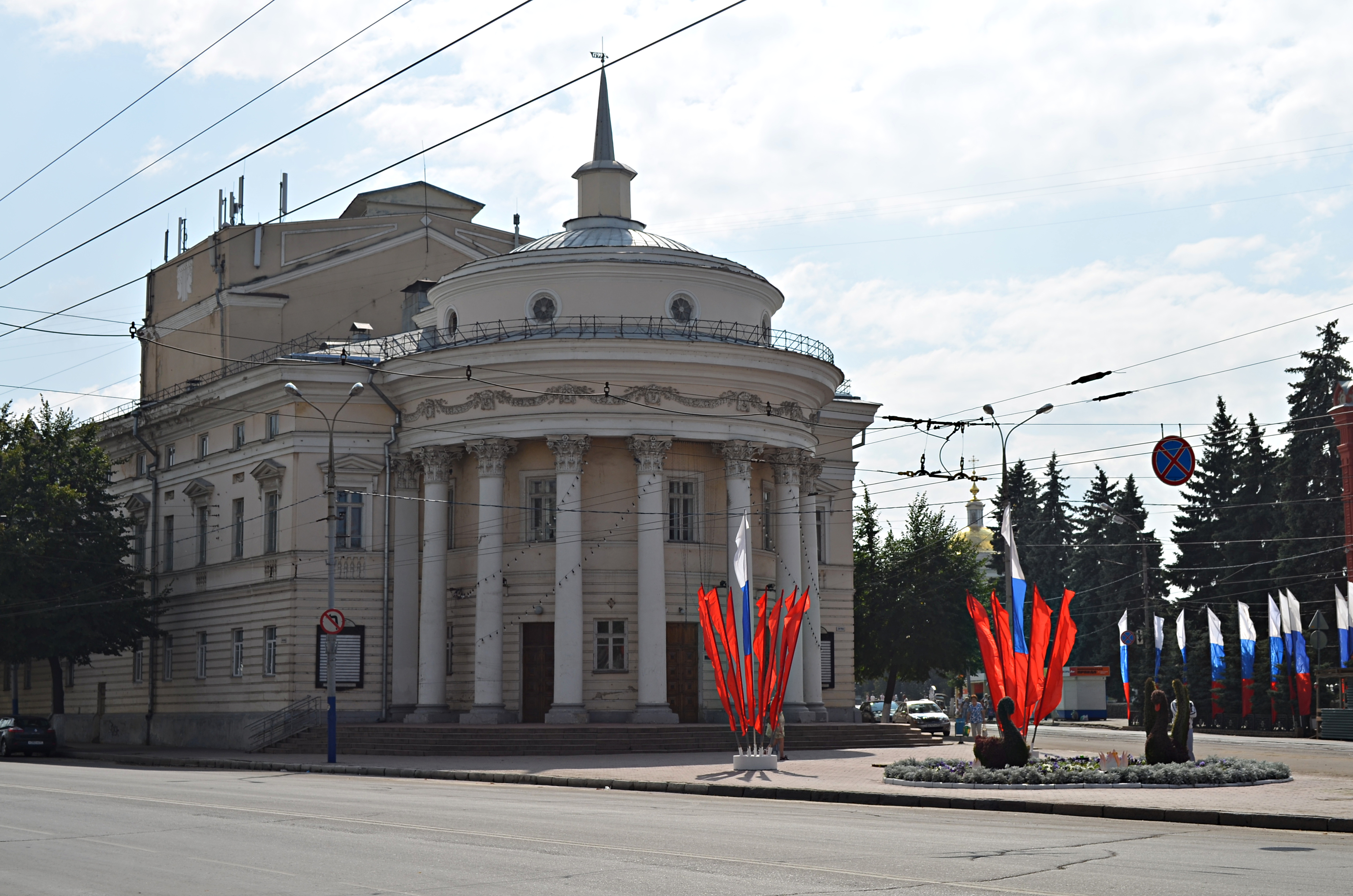 Здание магистрата (Орловская область, Орёл, Гостиная улица, 7 (6))